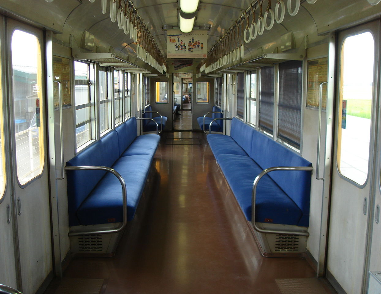 三岐鉄道北勢線270系電車（旧近鉄270系電車）K74編成車内